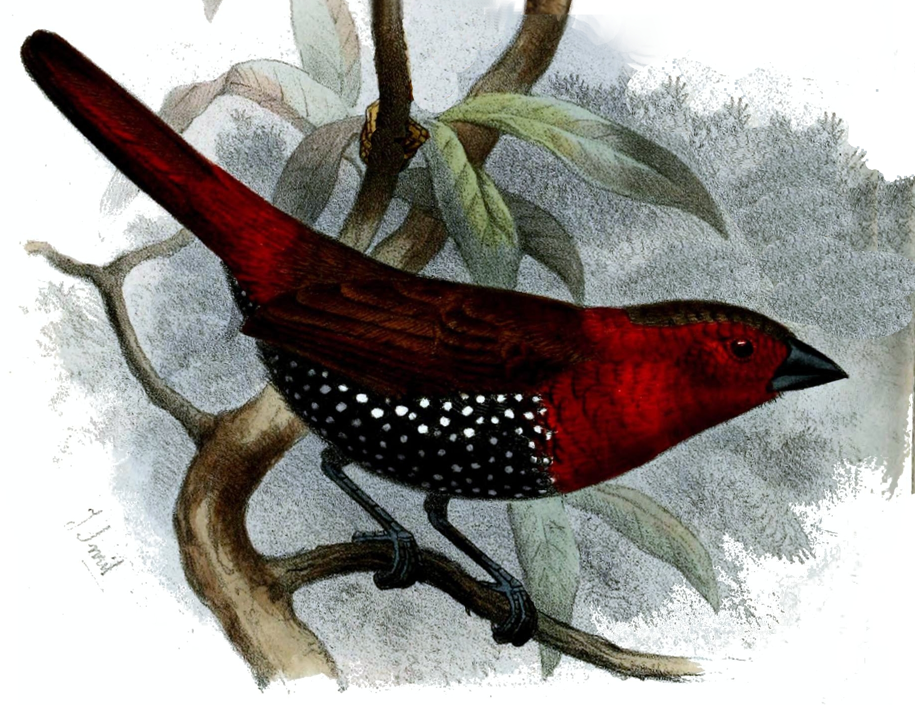 Hypargus niveiguttatus